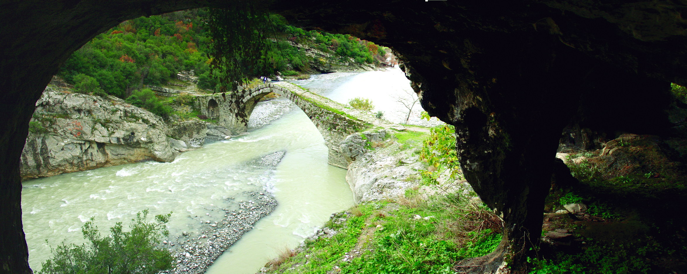 Ura e Katiut